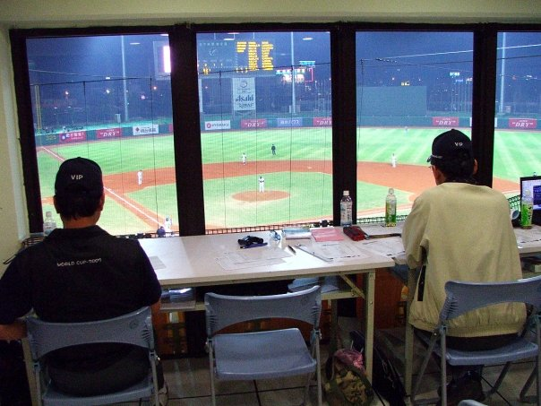 Postazione del classificatore ufficiale allo stadio Intercontinentale di Taichung (Taiwan)